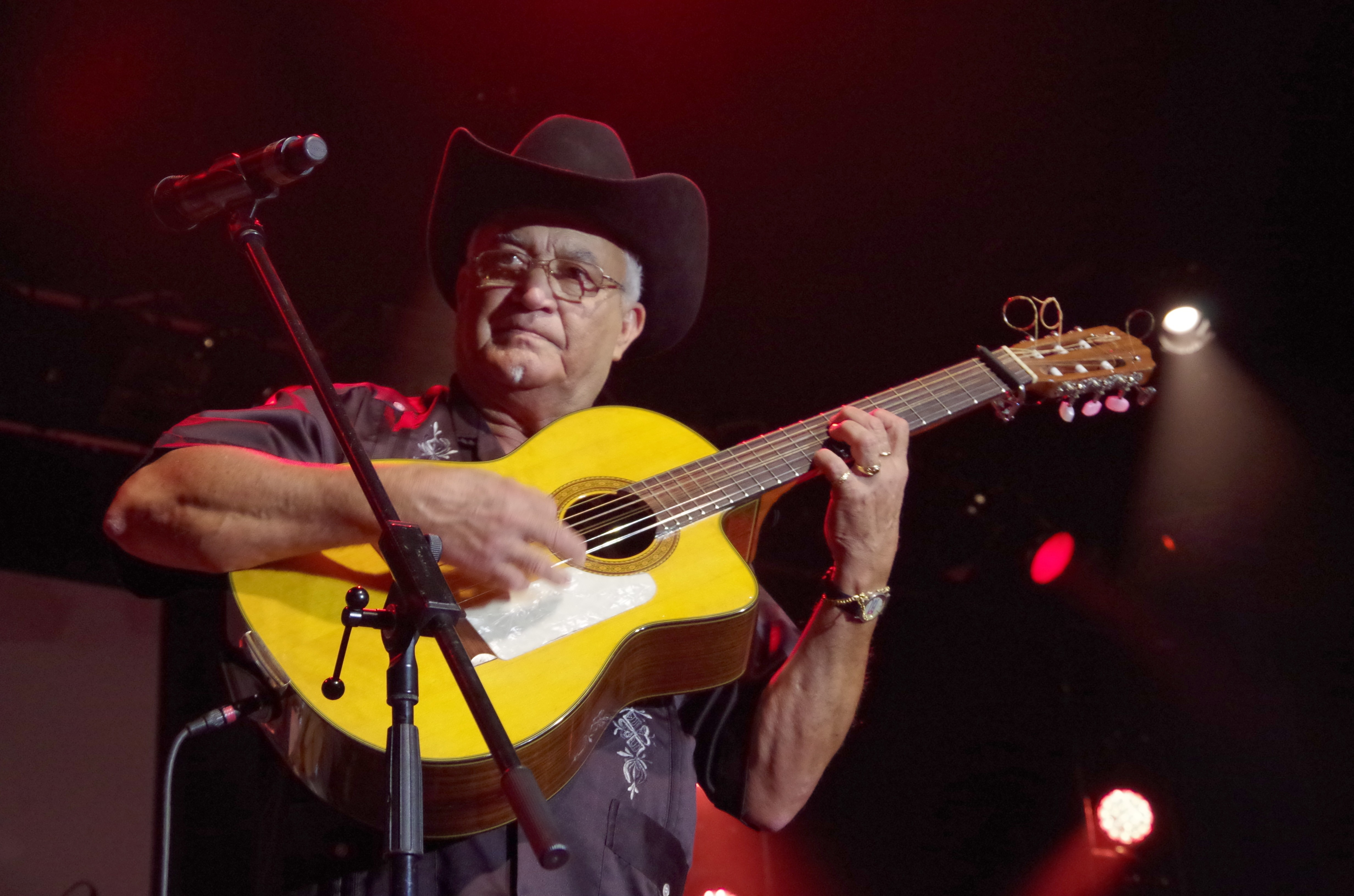 Das Zelt-Musik-Festival 2015 in Freiburg im Breisgau. 06.07.2015 Orquesta Buena Vista Social Club Eliades Ochoa